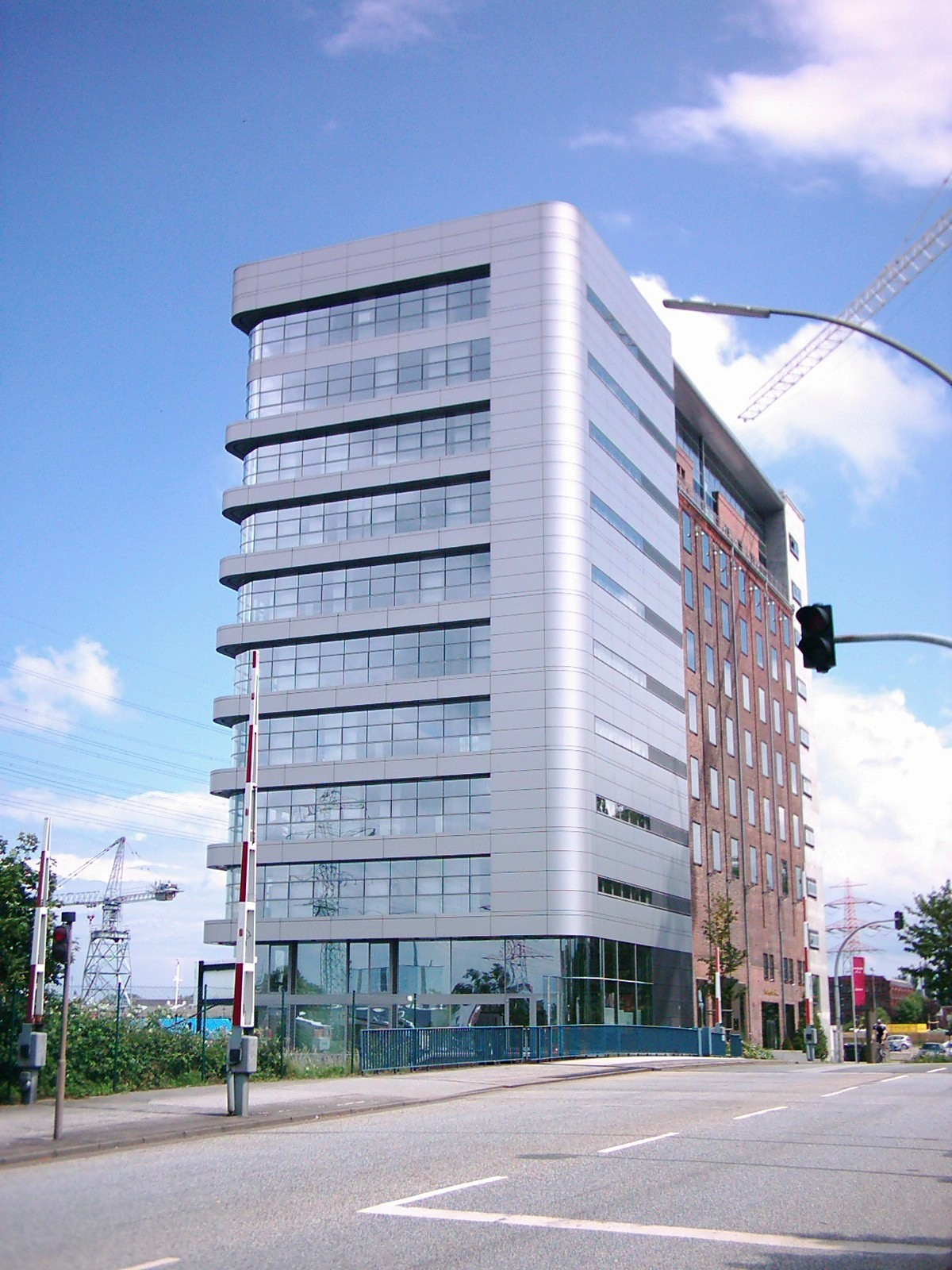 Deutscher Hauptsitz der technischen Prüforganisation Bureau Veritas S. A. in Hamburg-Harburg, Veritaskai.